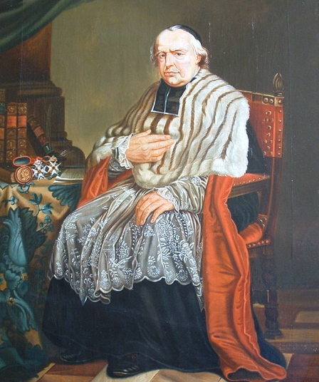 Pedro José Triest, fundador de los Hermanos de la Caridad